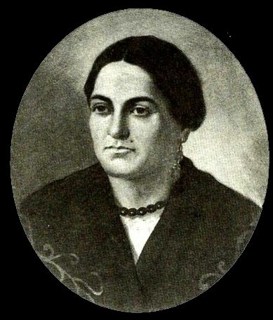 Martina Silva de Gurruchaga en su adultez